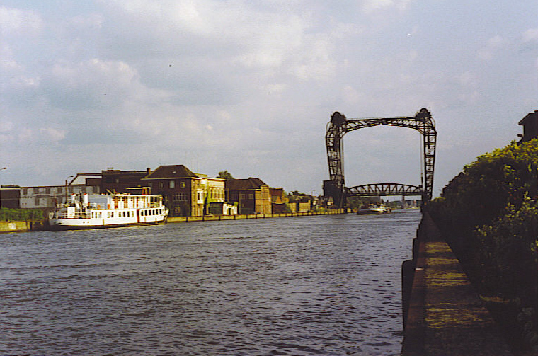 zelf gemaakt